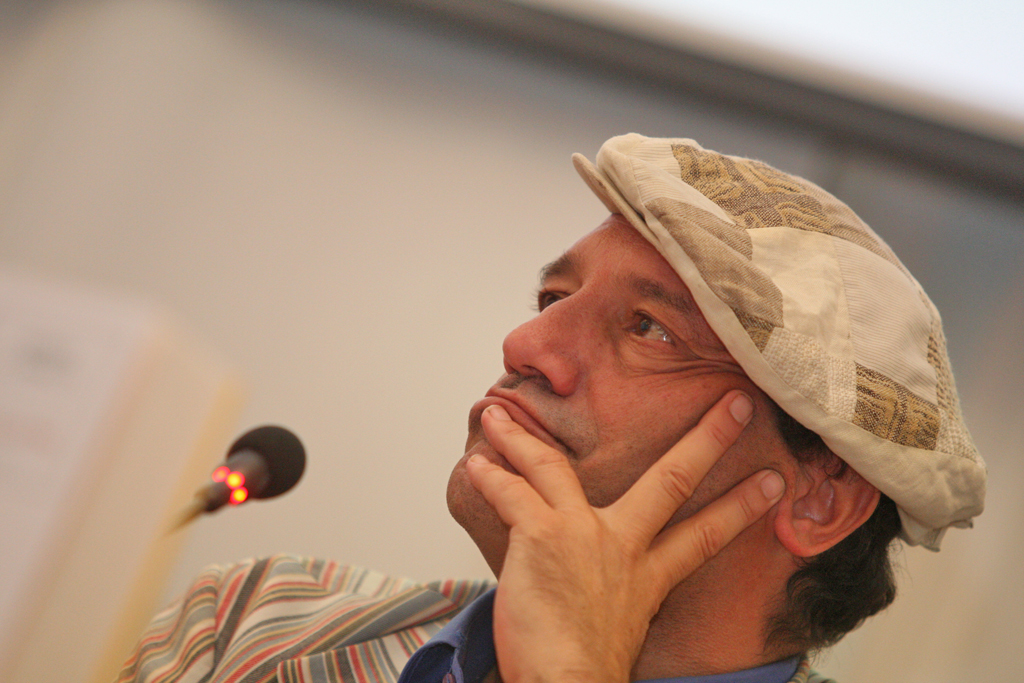 Andrea G. Pinketts